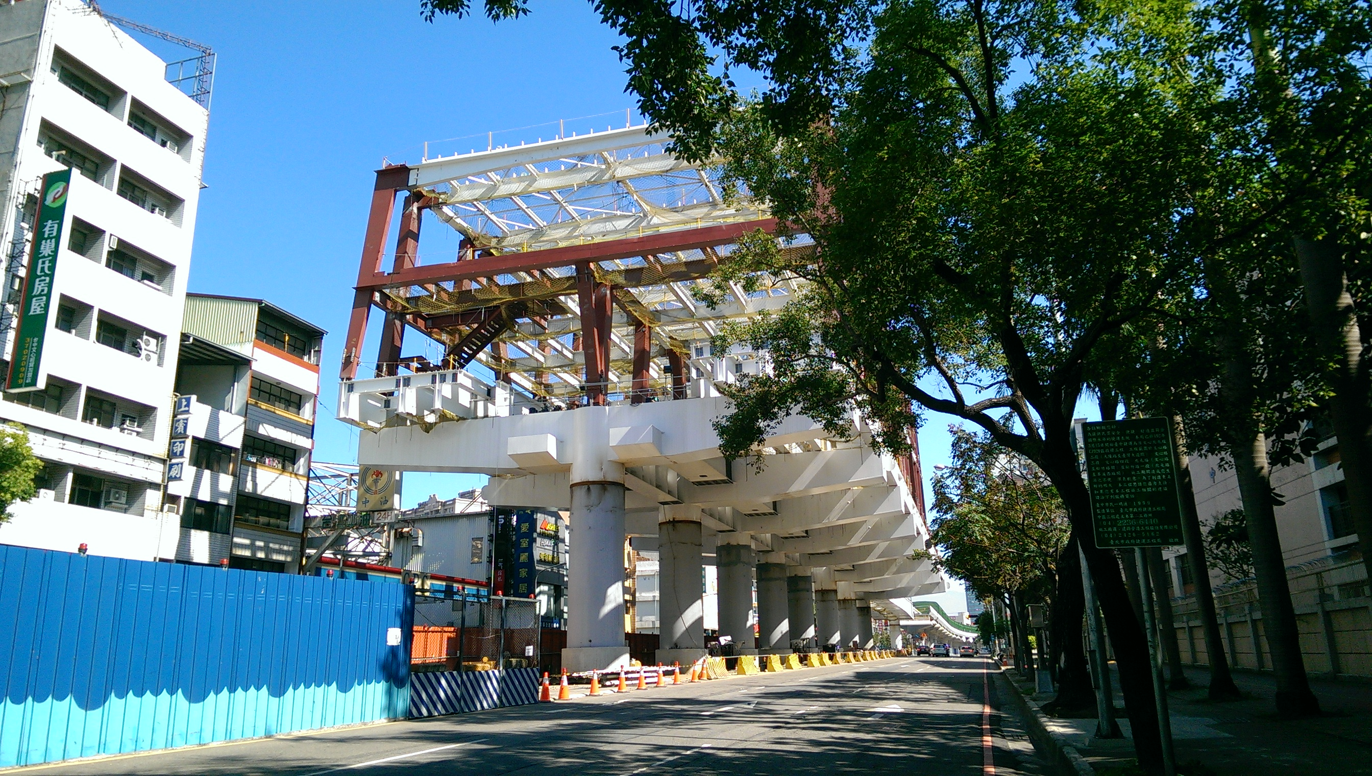 臺中捷運G8站2016年1月工程